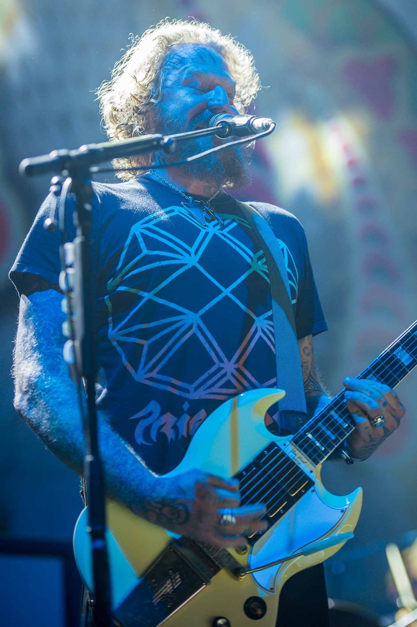 ARGO-Konzerte,Arena Nürnberger Versicherungen,Brent Hinds,Clubstage,Konzert,Livekonzert,Livemusik,Mastodon,Musik,RiP,Rock im Park 2014